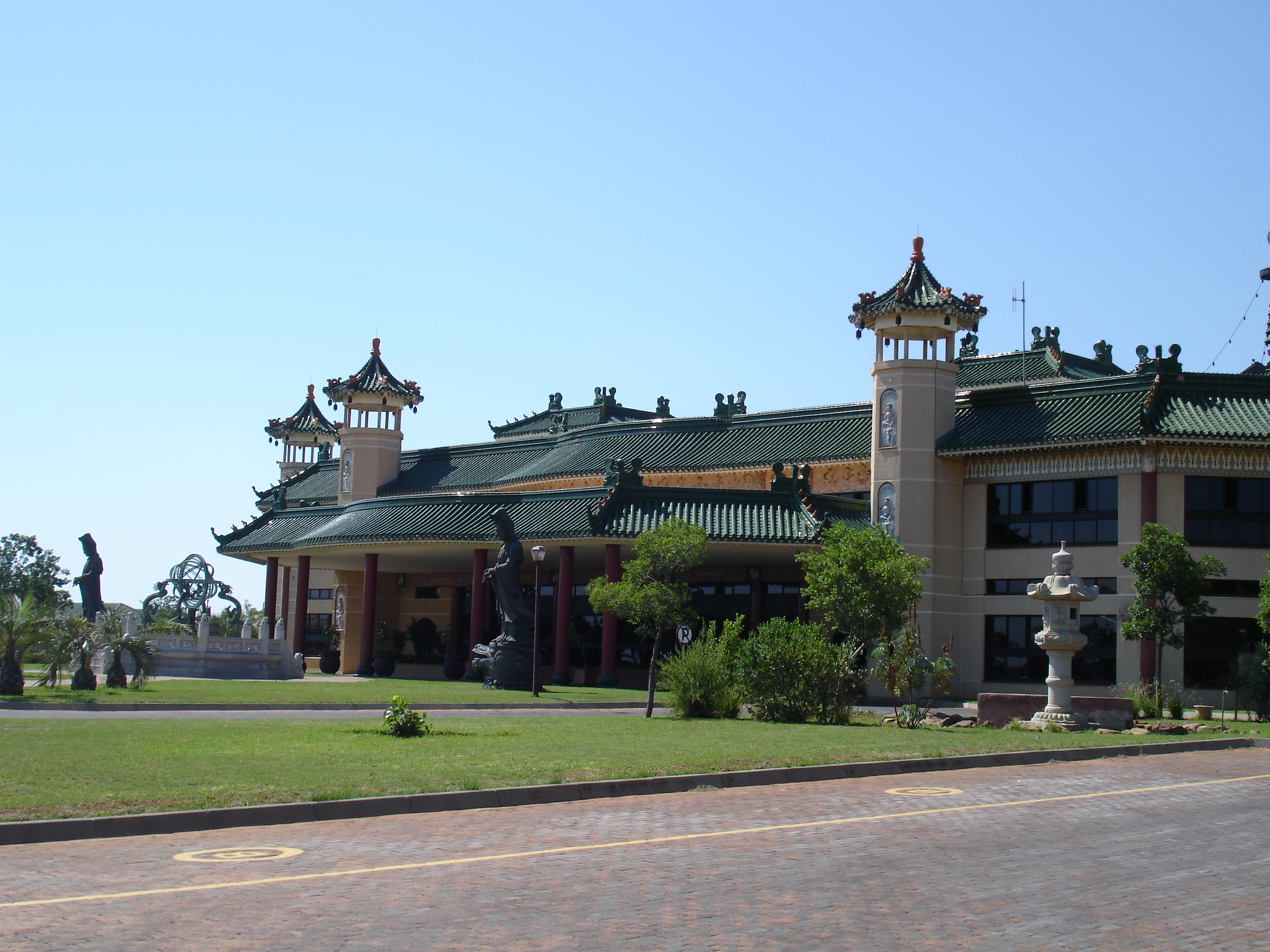 Nan Hua Temple